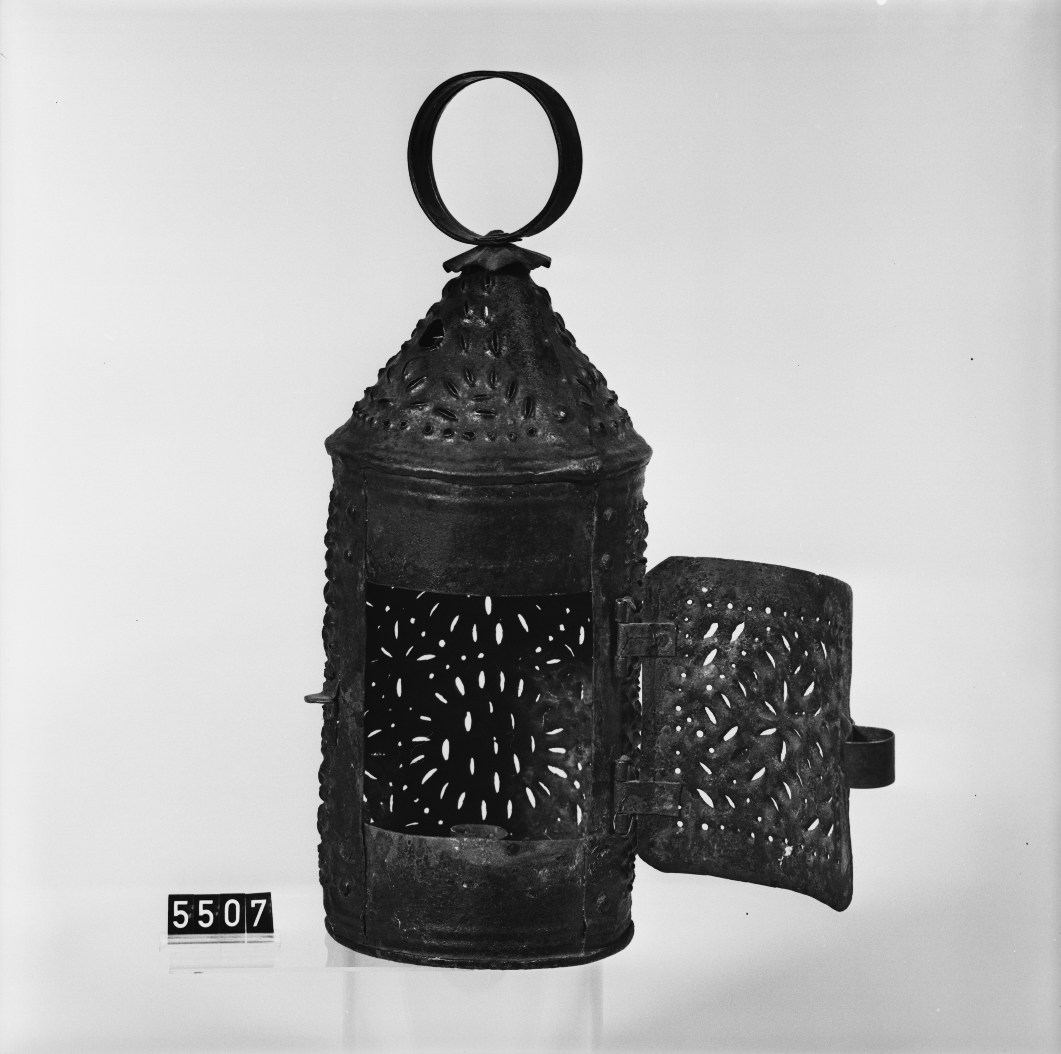 Stjärnsundslykta, kjolvärmare